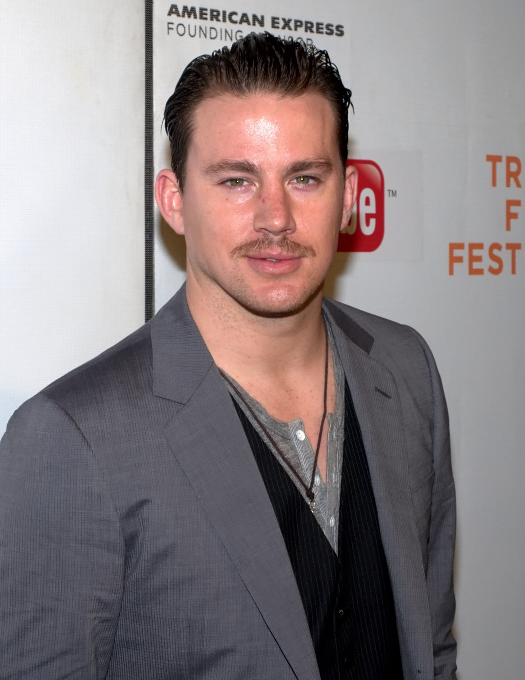 Ченнинг Татум на кинофестивале Трайбека в 2010 году